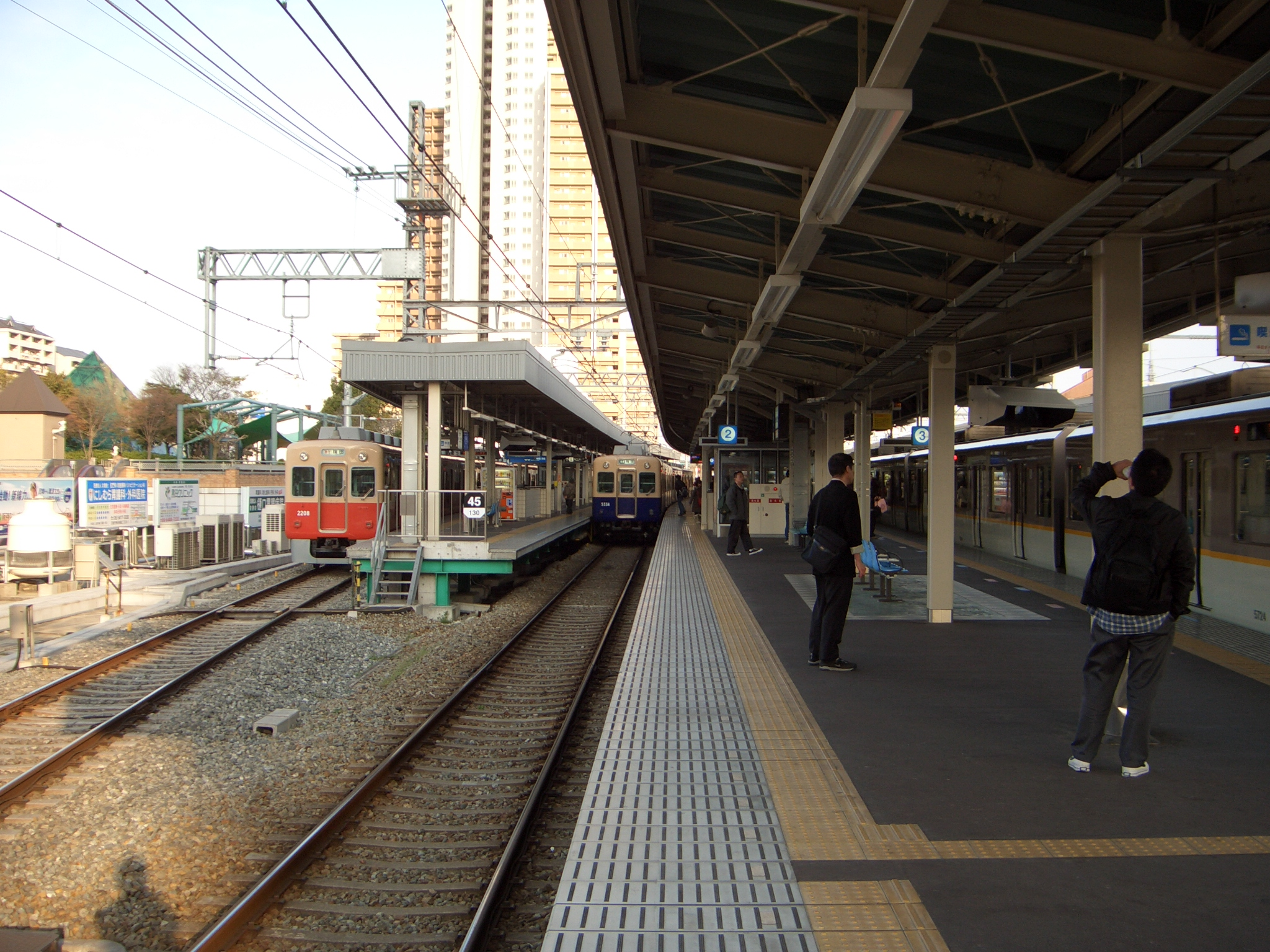 阪神電気鉄道尼崎駅の1番2番3番のりば。